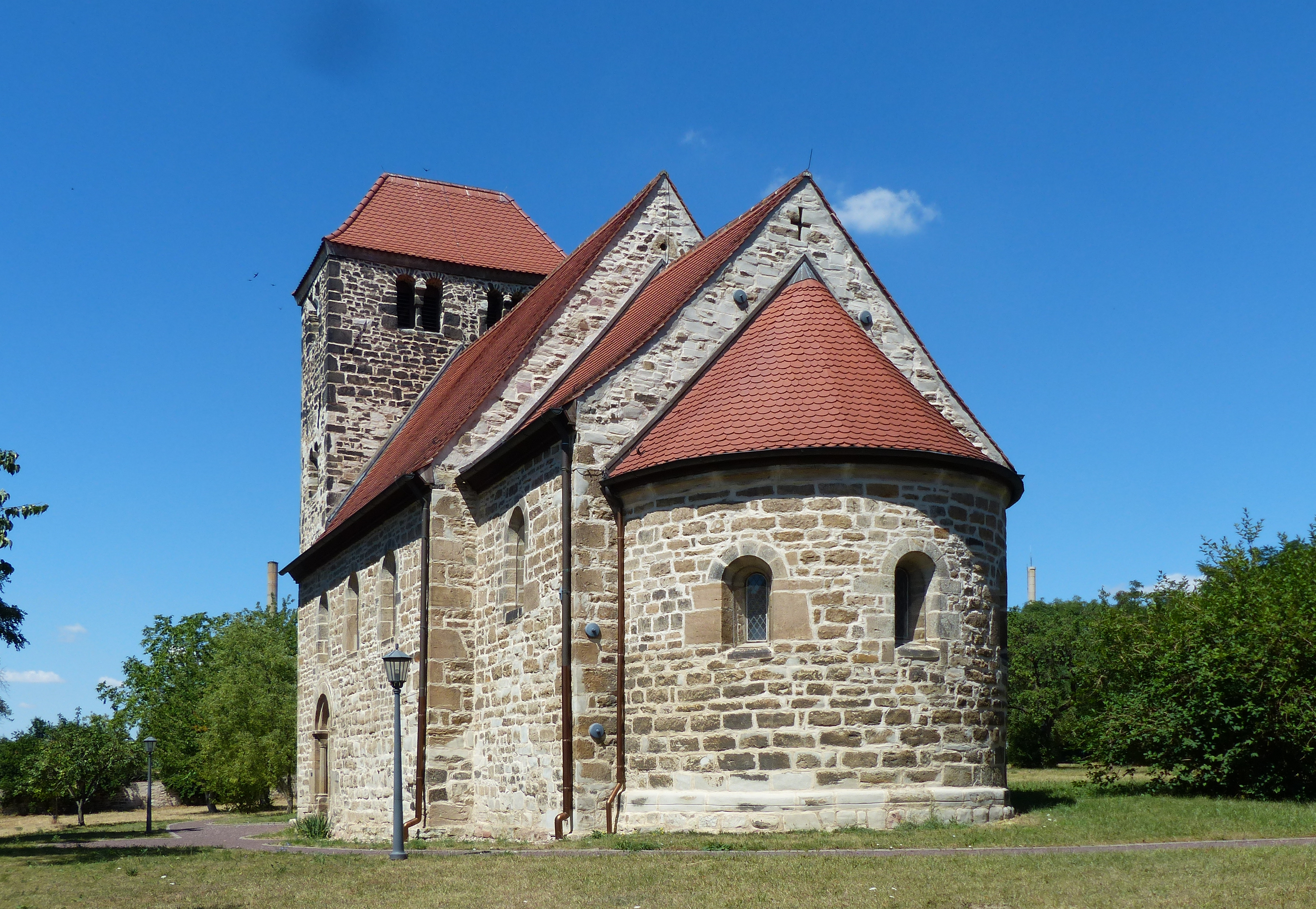 Die Dorfkirche St. Stephani des einstigen Ortes Waldau - jetzt zur Stadt Bernburg gehörig - wurde von 1170 - 1180 errichtet. Sie hat im Laufe der Zeit etliche Veränderungen erfahren, ihre ürsprüngliche romanische Gestalt aber bewahrt: typisch die Abfolge: Turm, Schiff, Chor, Absis.